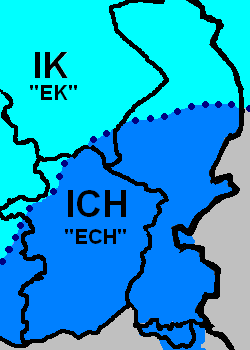 Eigen kaart